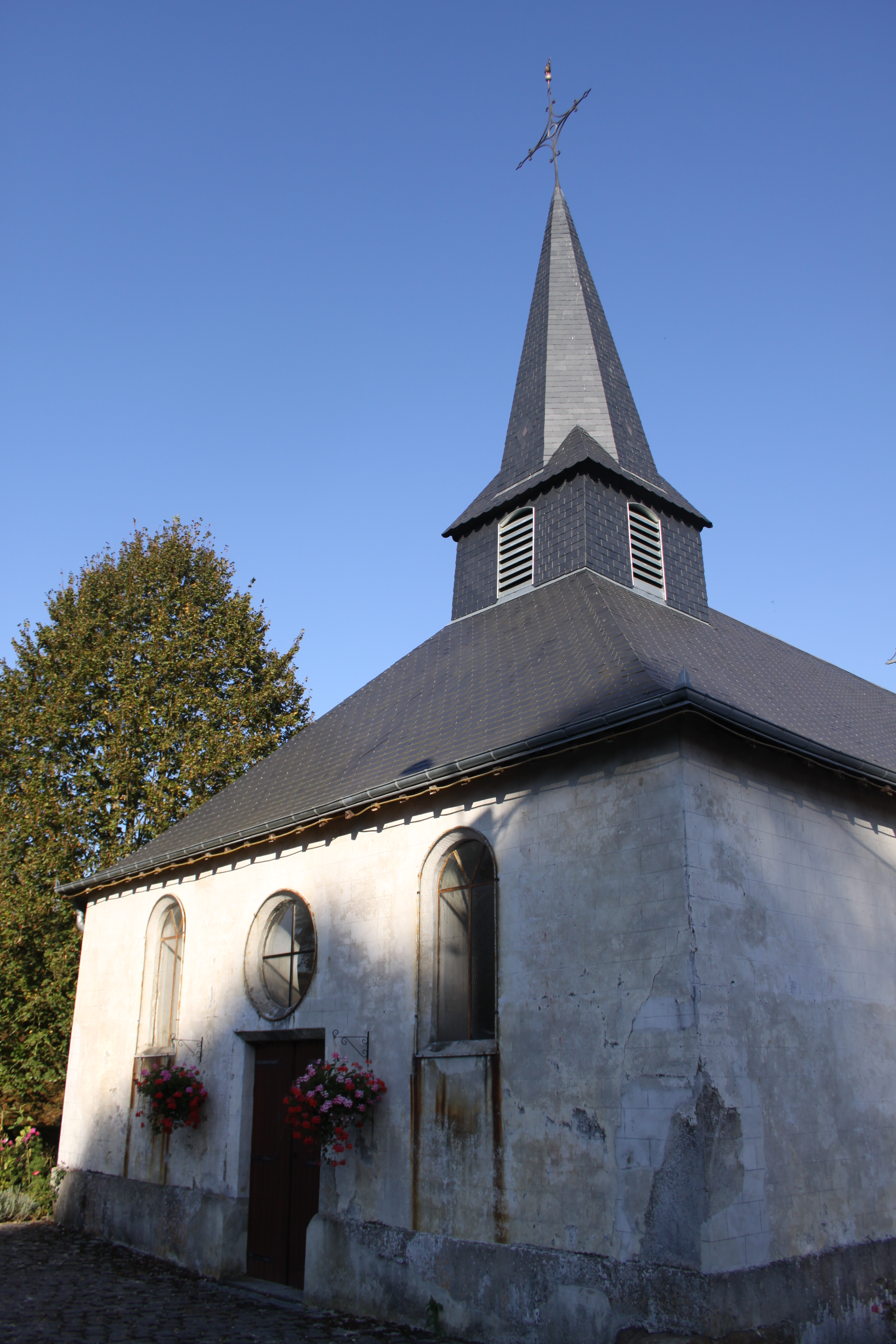 Village Ardennais